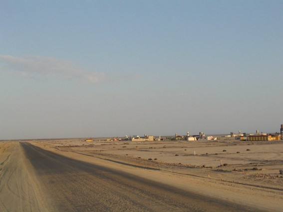 Henties Bay, uma cidade na Costa dos Esqueletos na Namíbia. Fotografia tirada por Muriel von Holstein-Gottrop em Abril de 2004. Redistribuição autorizada segundo os princípios do GFDL.